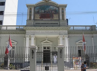 Fachada de la sede oficial de la "Benemerita Sociedad Fundadores de la Independencia".